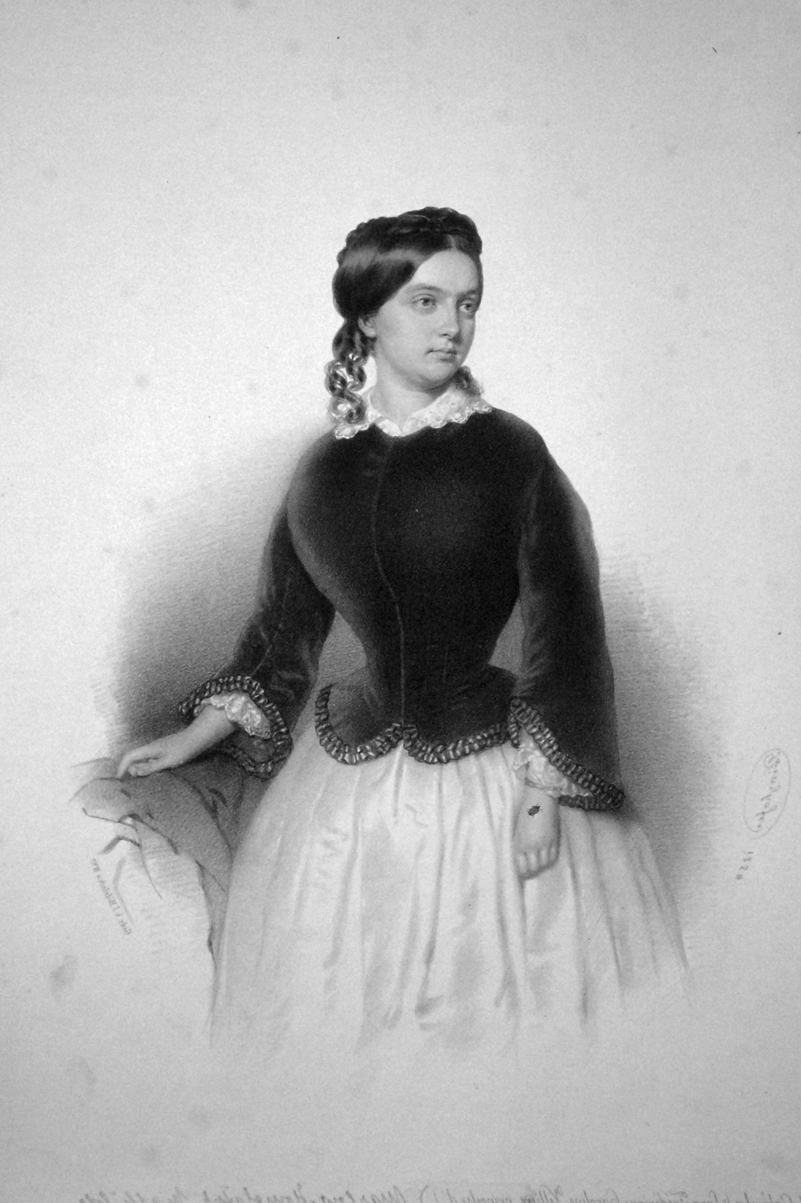 Mathilde von Marlow-Homolatsch (1828-1888), geborene Wolfram, war eine österreichische Opernsängerin. Lithographie von August Prinzhofer, 1854